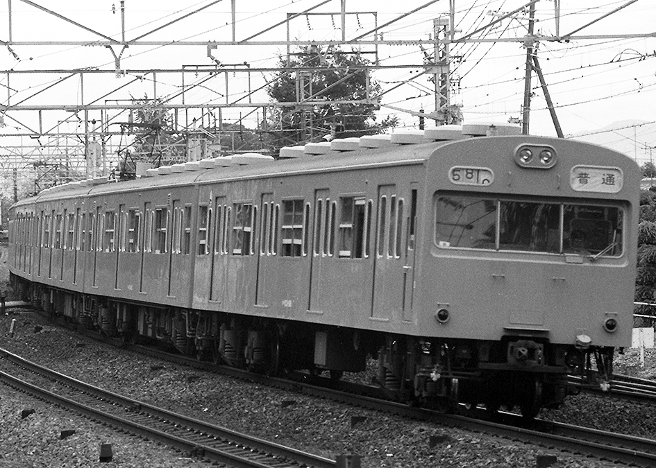 国鉄103系電車 7両編成